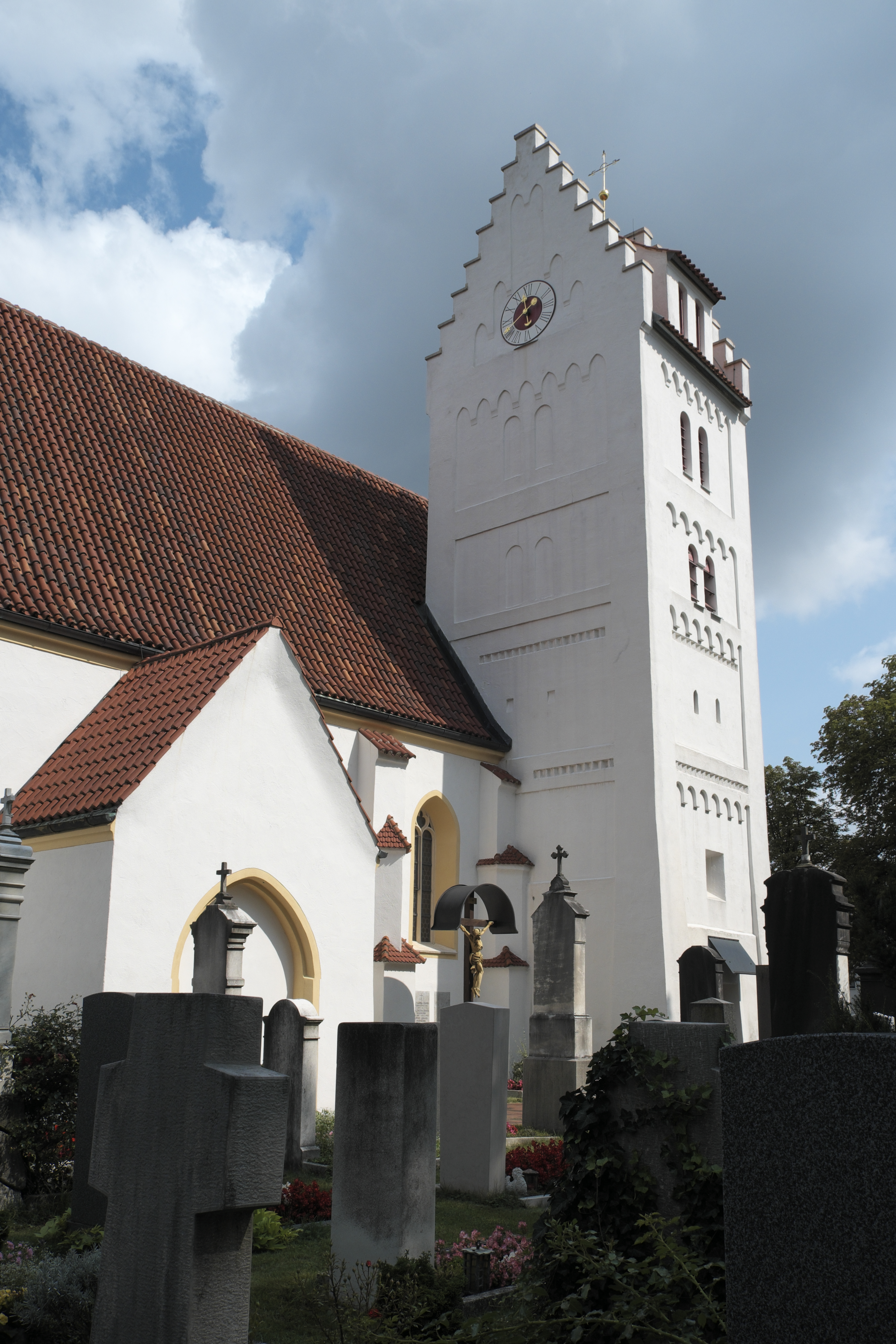 Katholische Pfarrkirche St. Martin in Untermenzing im Stadtbezirk Allach-Untermenzing in München (Bayern/Deutschland)